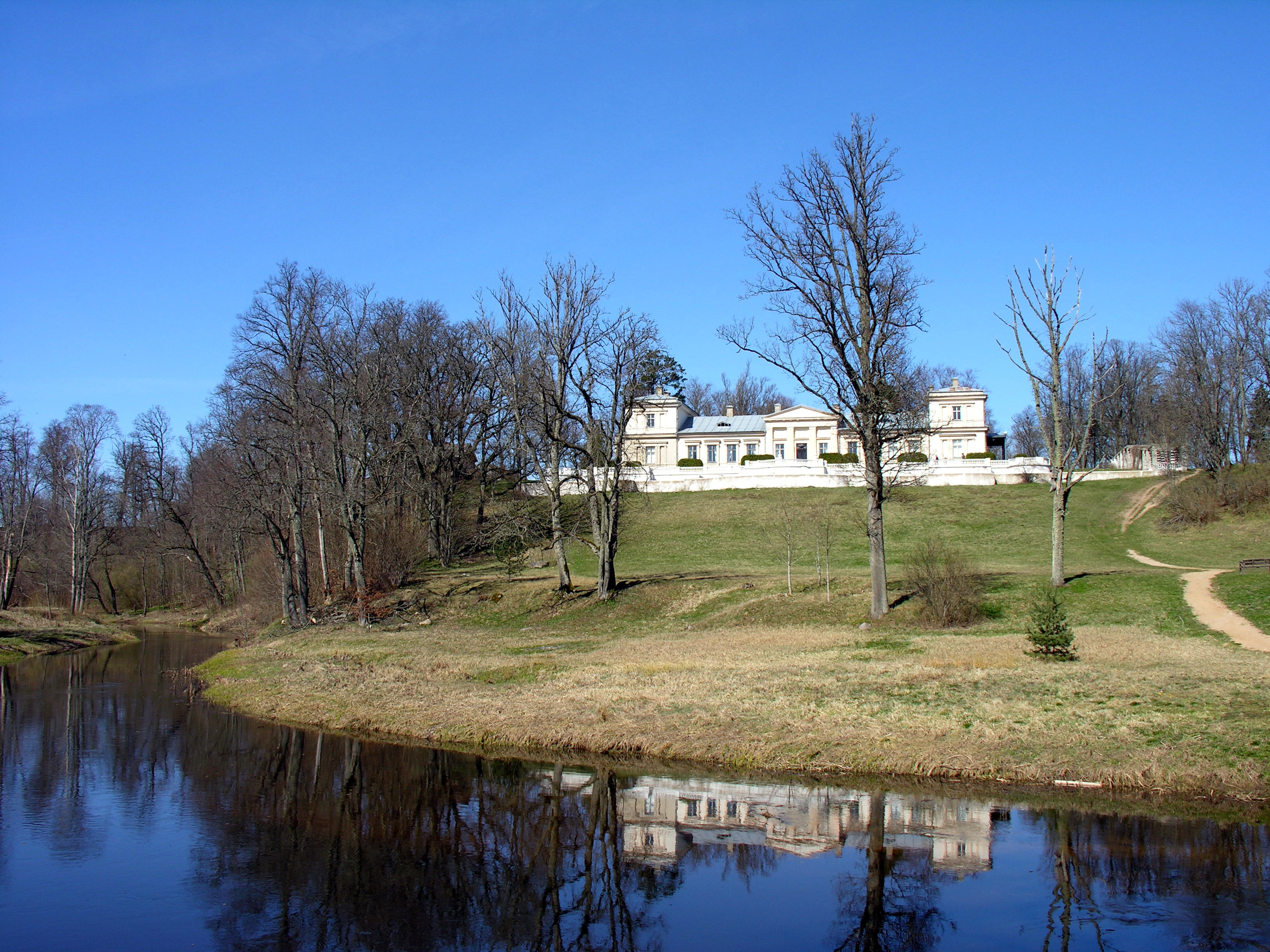 Renavas, dvaro rūmai 2007 m. balandžio 15 d., Lietuva